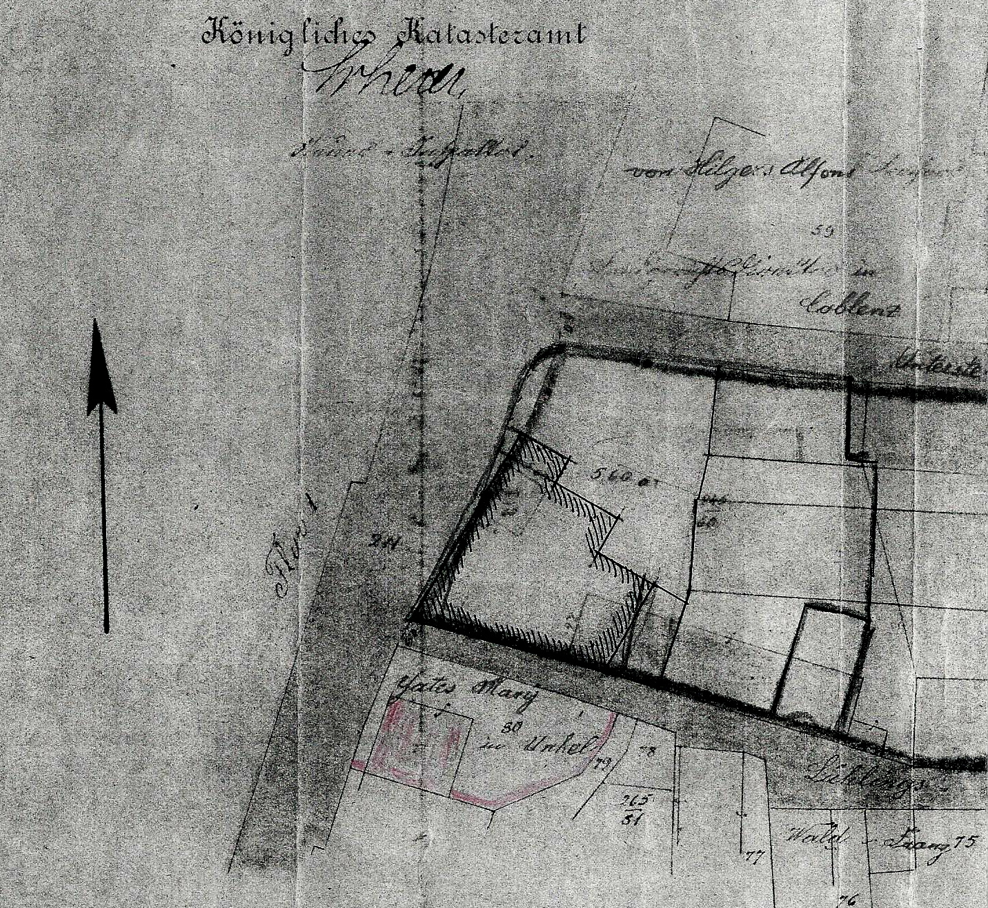 Unkel, Lageplan Yateshaus, 12. Oktober 1909 (Ausschnitt).